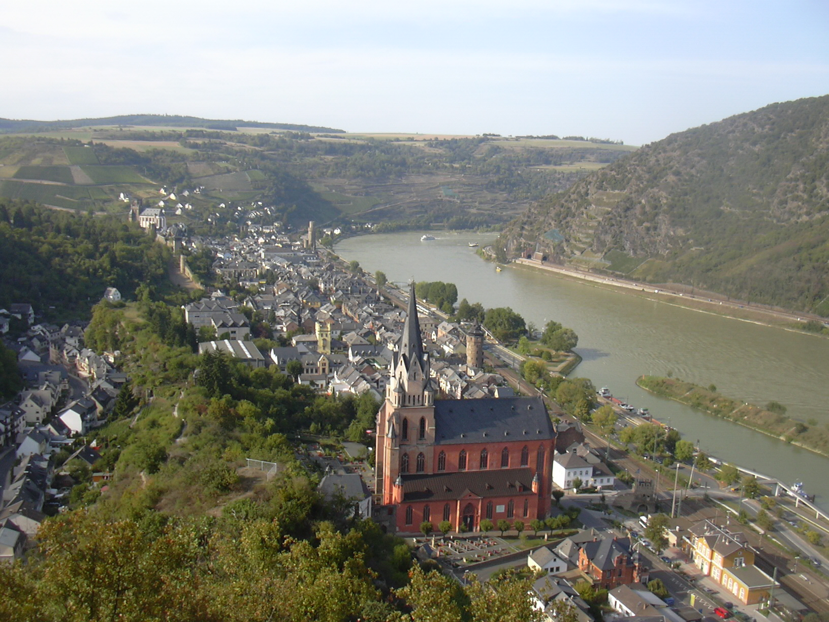 Schönburg Castle, Flaggenwiese lookout to Oberwesel, Rhine Valley/Germany